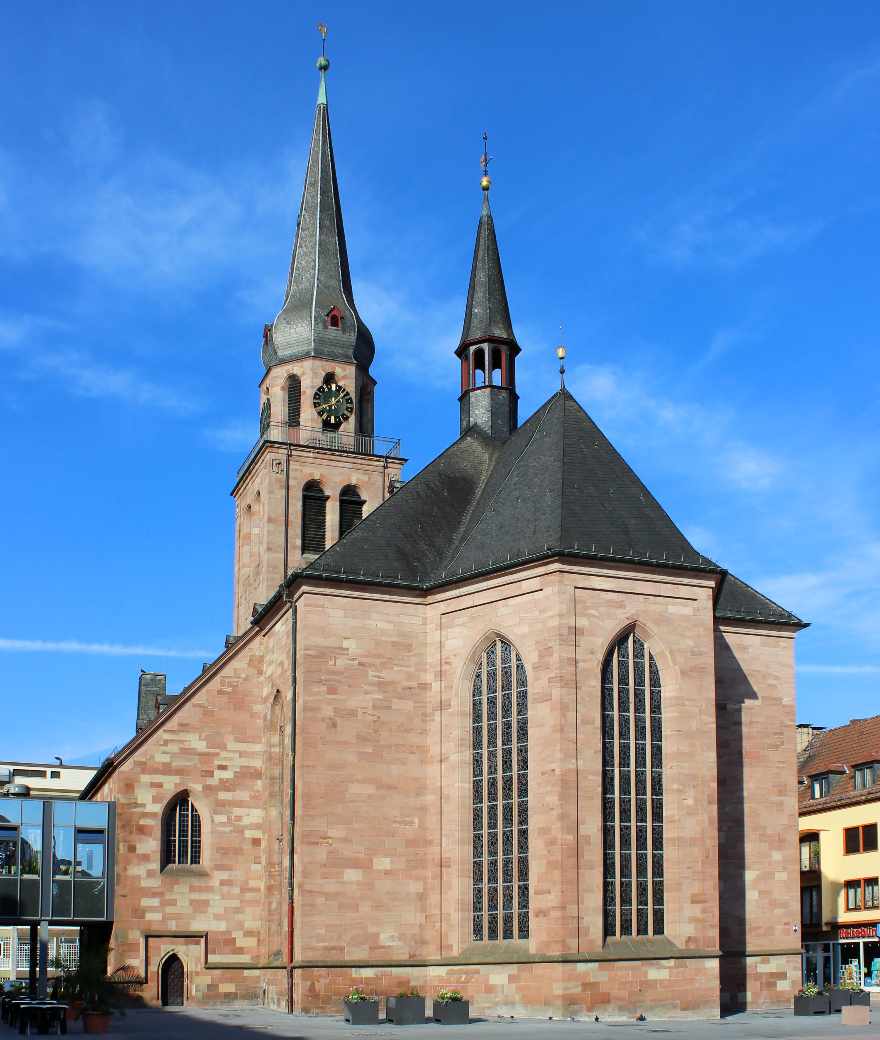 Die evangelische Alexanderskirche in Zweibrücken, Rheinland-Pfalz